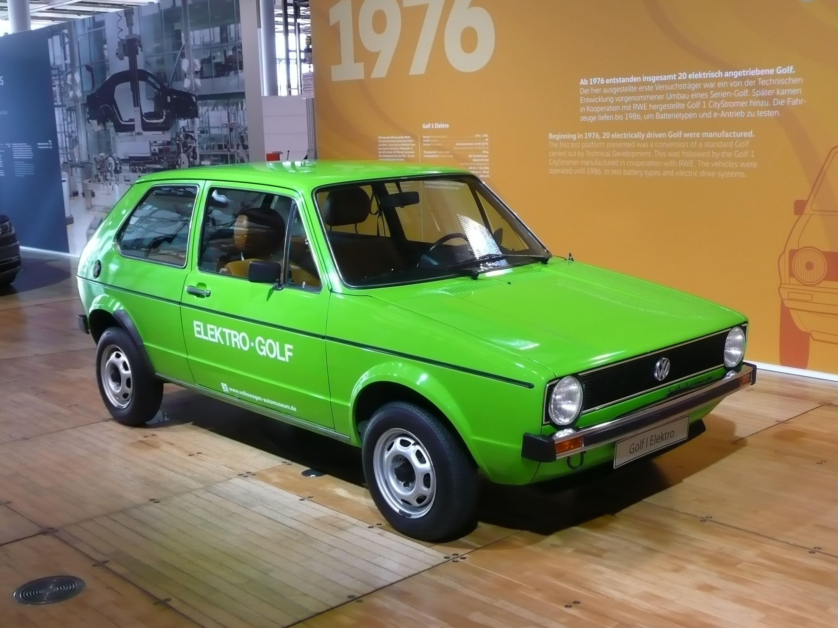 Der 1. Elektrogolf aus dem Jahr 1976, ausgestellt in der Gläsernen Manufaktur